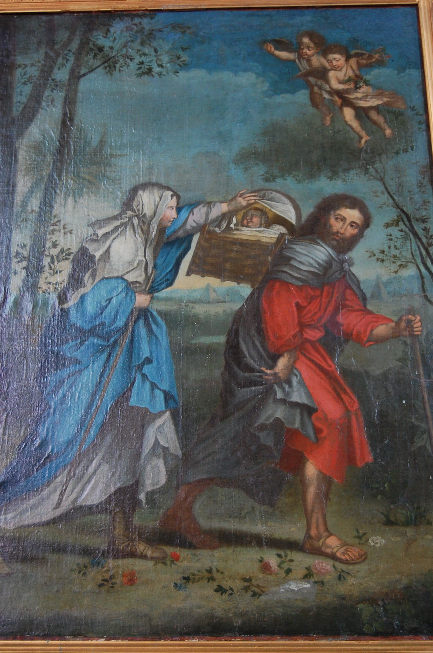 To Egypt